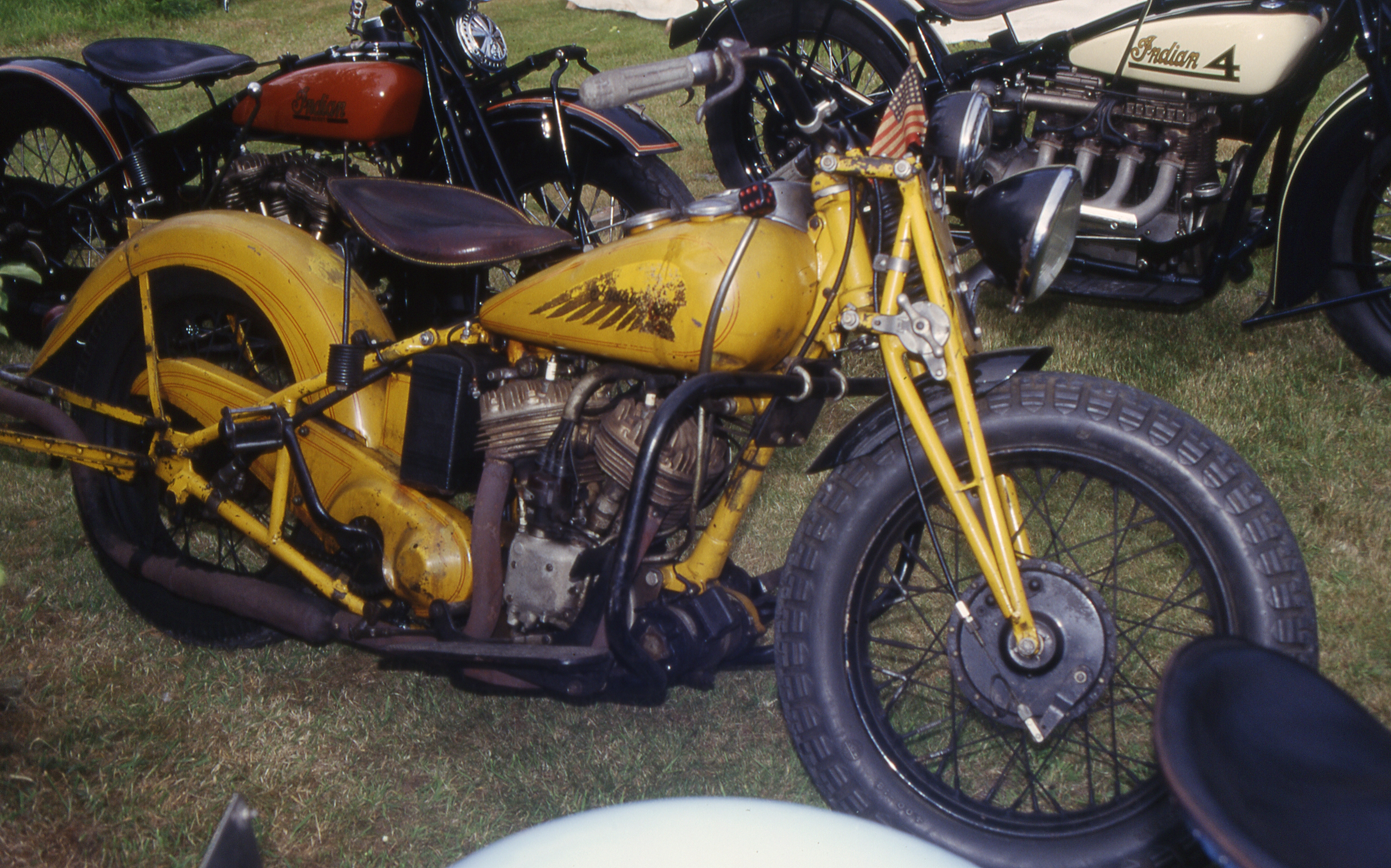 Indian Sport Scout 1939 V2, seitengesteuert, 744 ccm, 25 PS